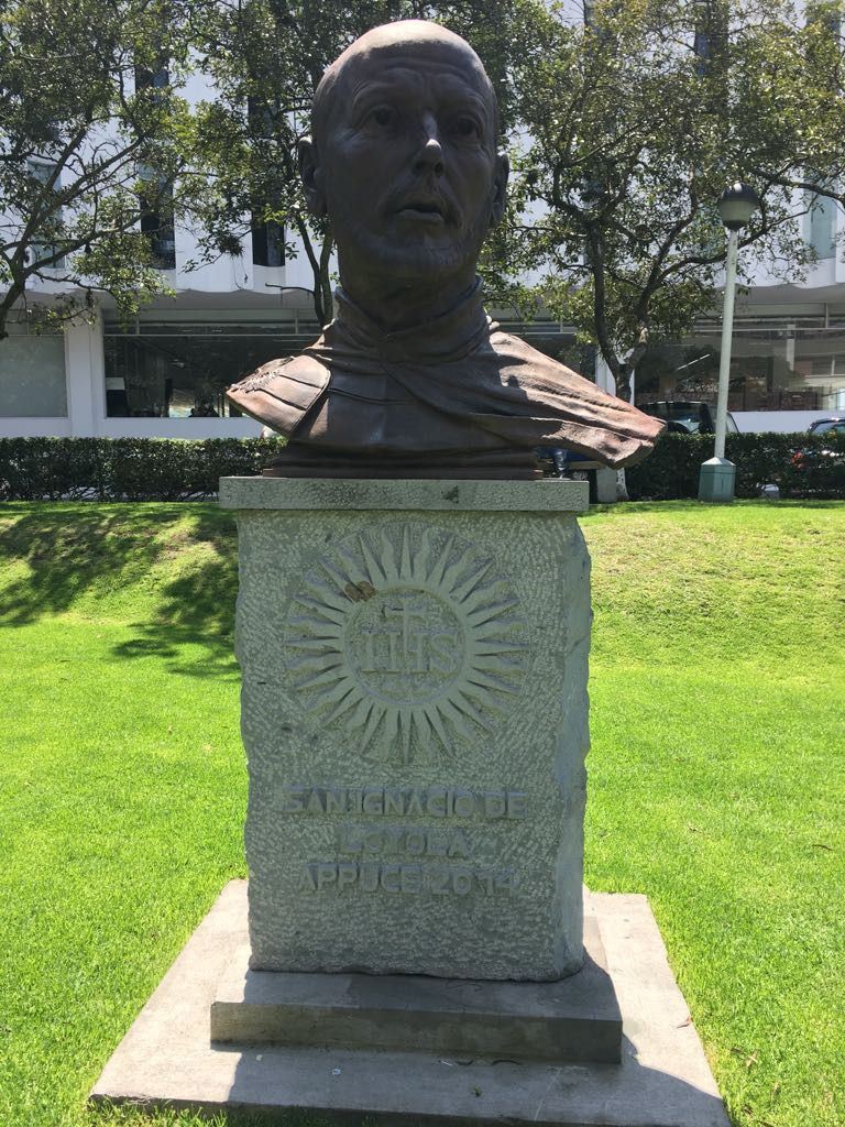 Monumento San Ignacio de Loyola